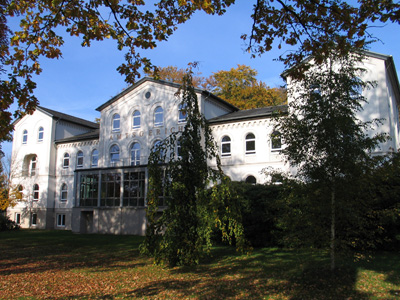 Amtgericht Reinbek, ehemals Sophienbad